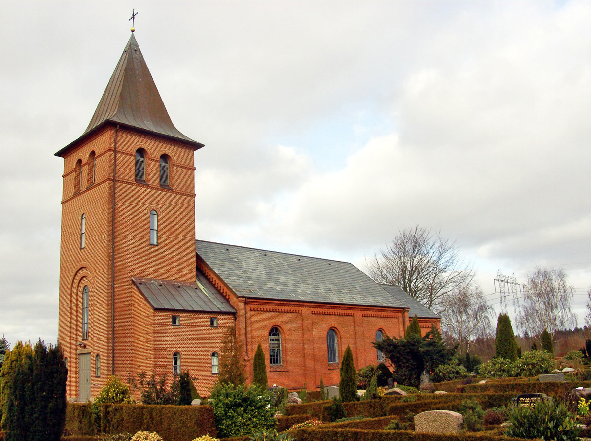 fra sydvest